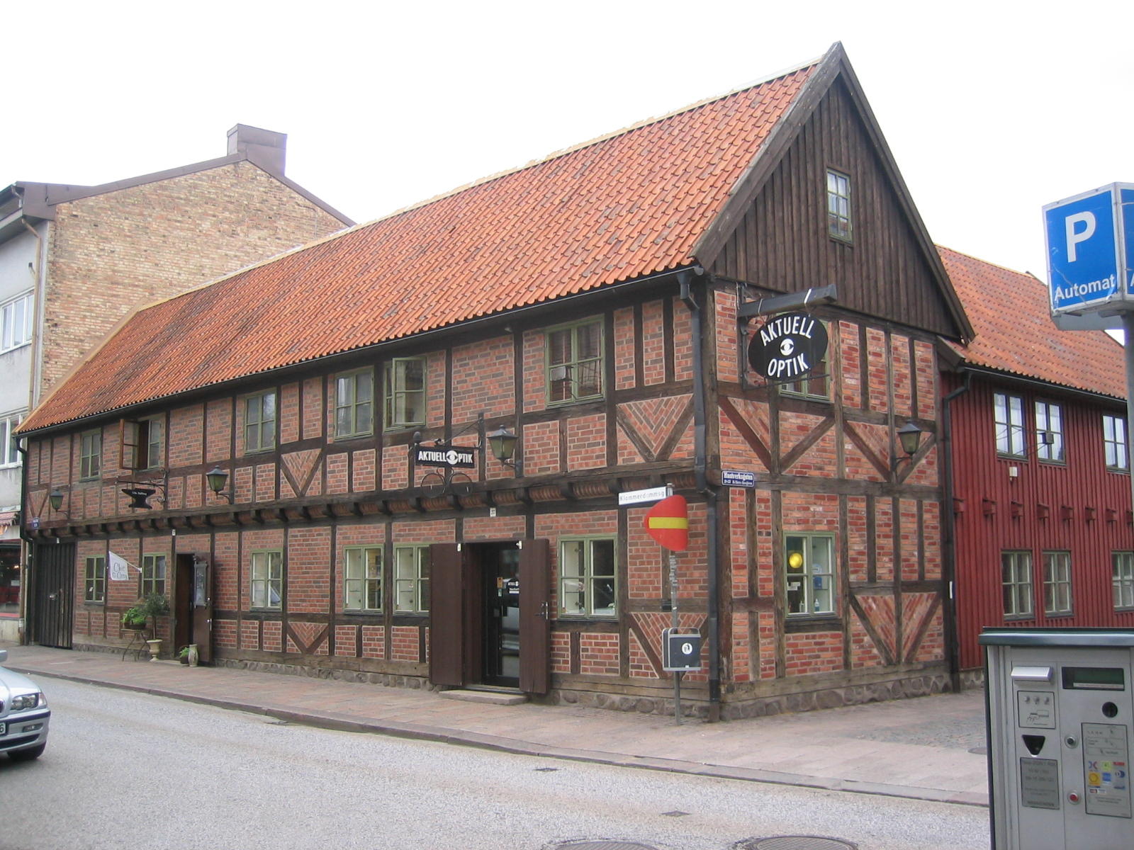 Mellgrenskahuset Halmstad